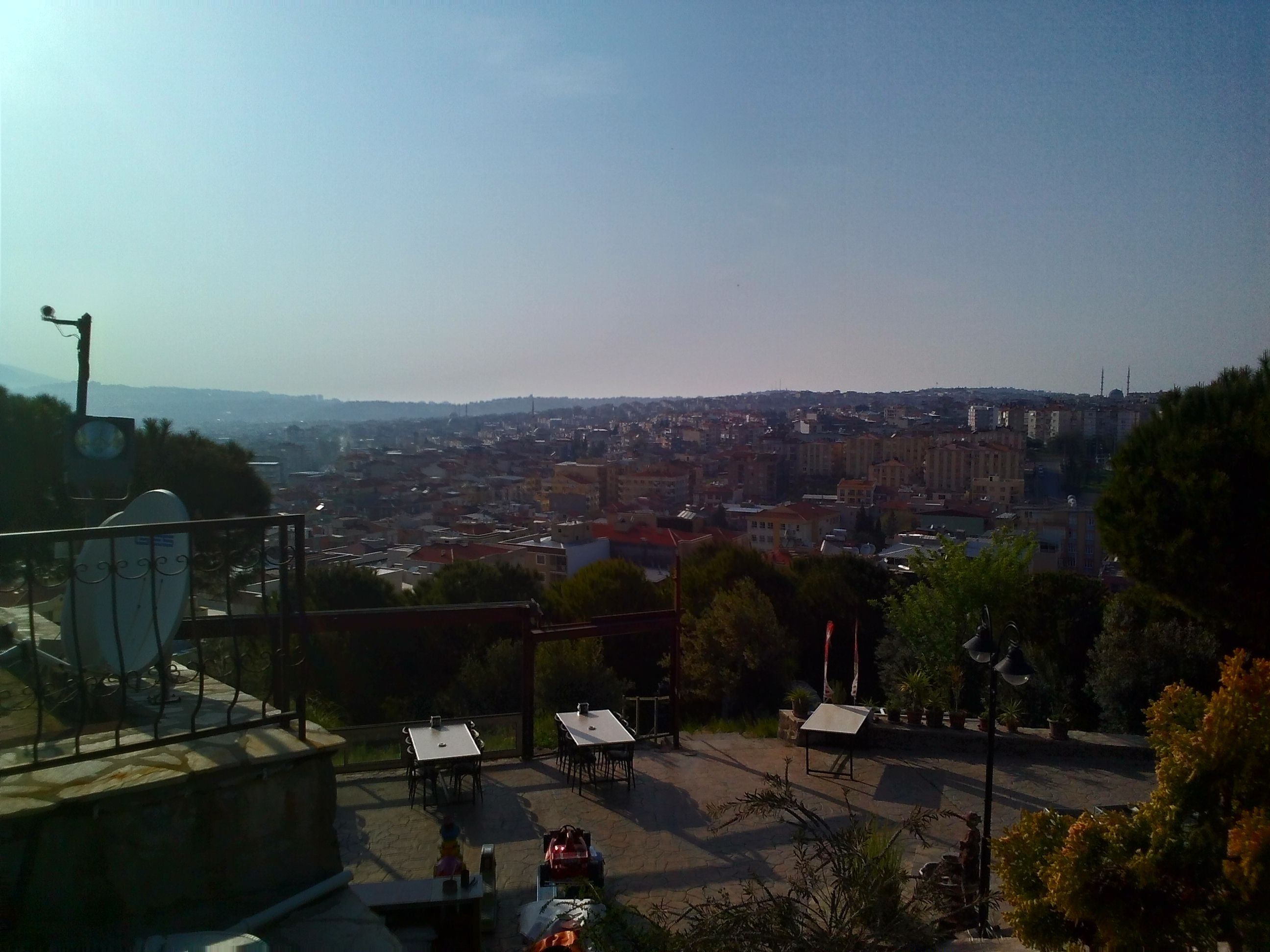 İzmir ili Buca ilçesinde bulunan Mevlana heykeli ve mesire alanına ait, kendi çektiğim bir görüntü. Görüntüde heykelden Buca ilçesi kuş bakışı gözükmektedir.